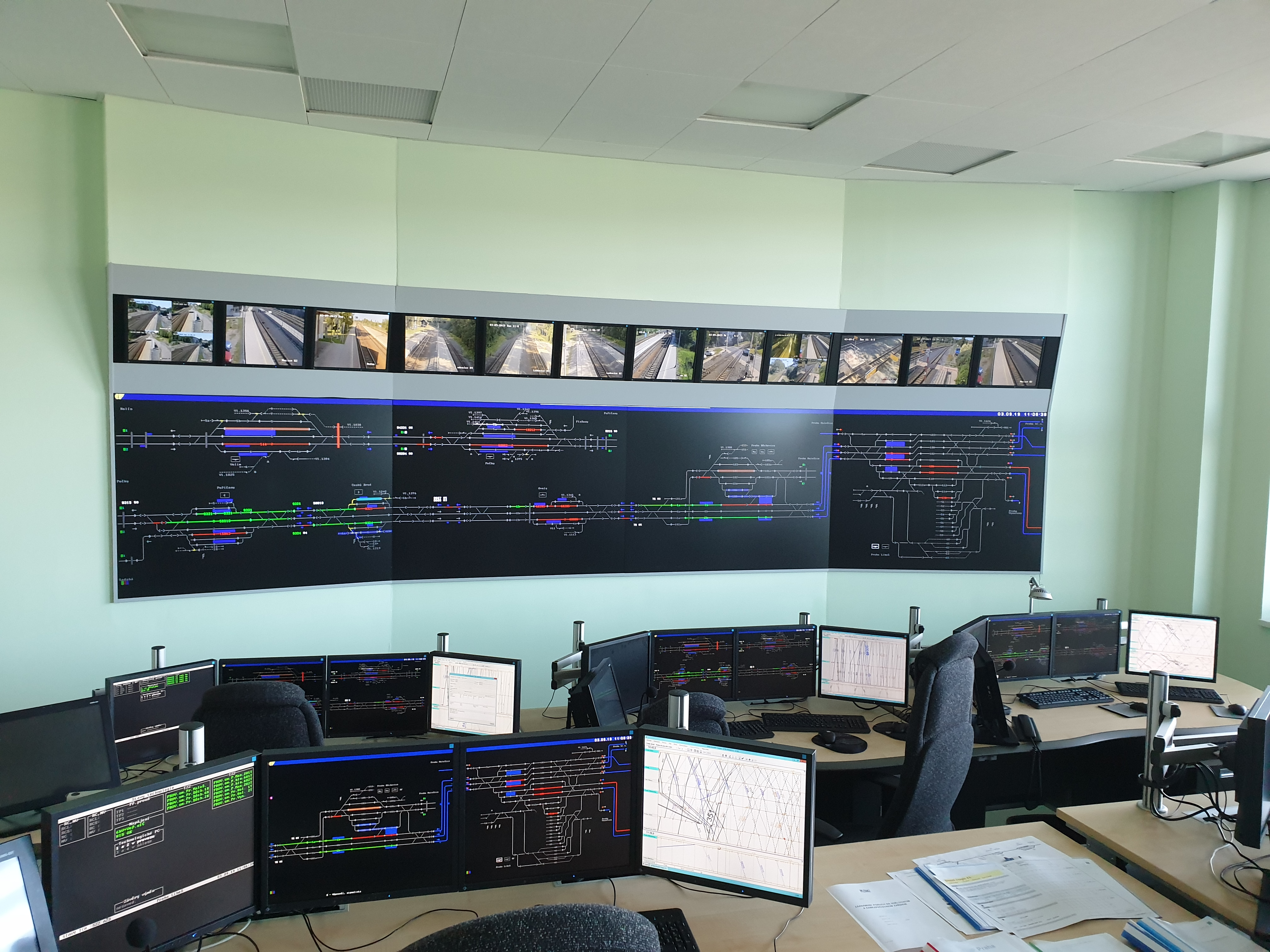 Cvičný sál CDP Praha